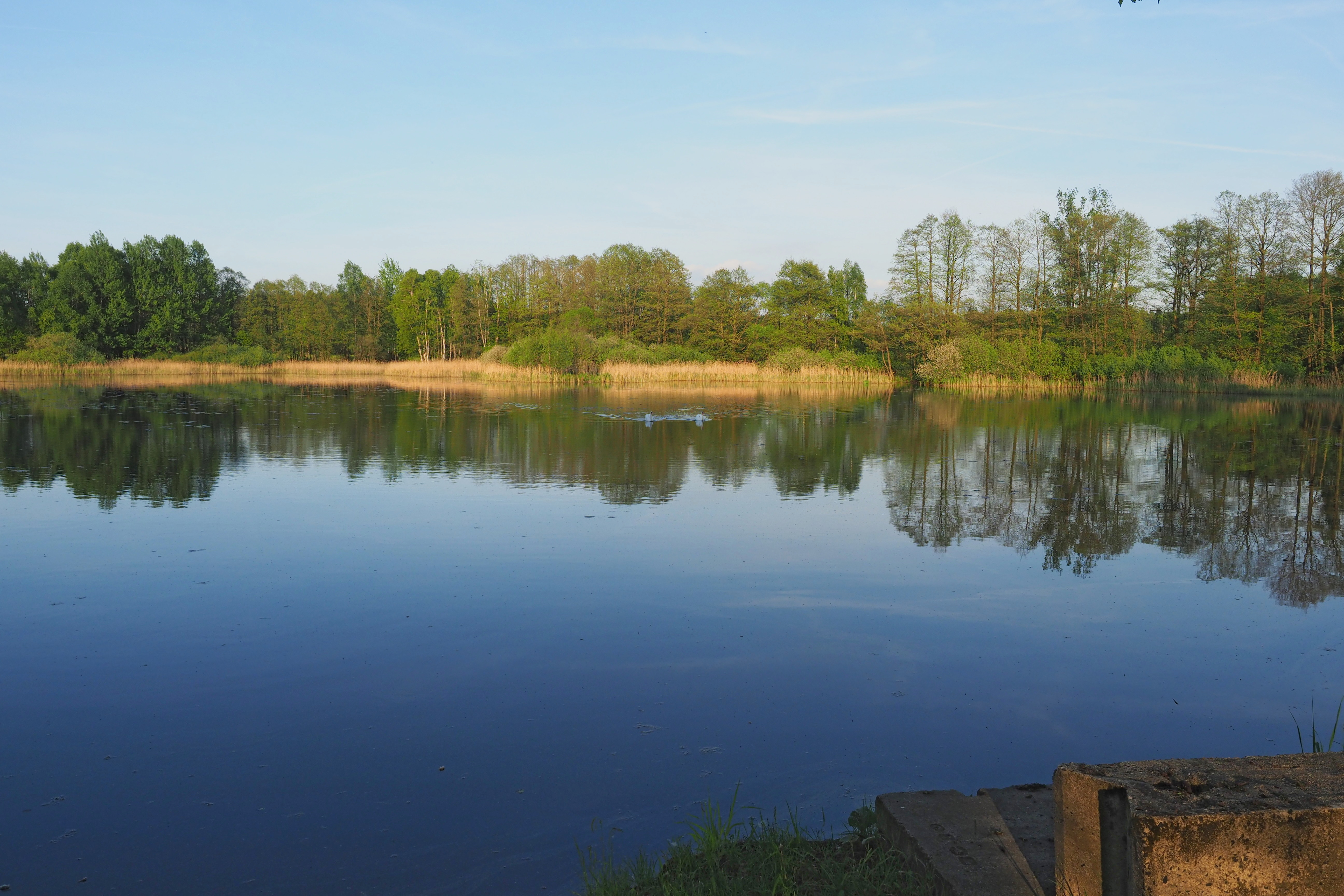 Naturschutzgebiet Molkenbornteiche bei Stölpchen